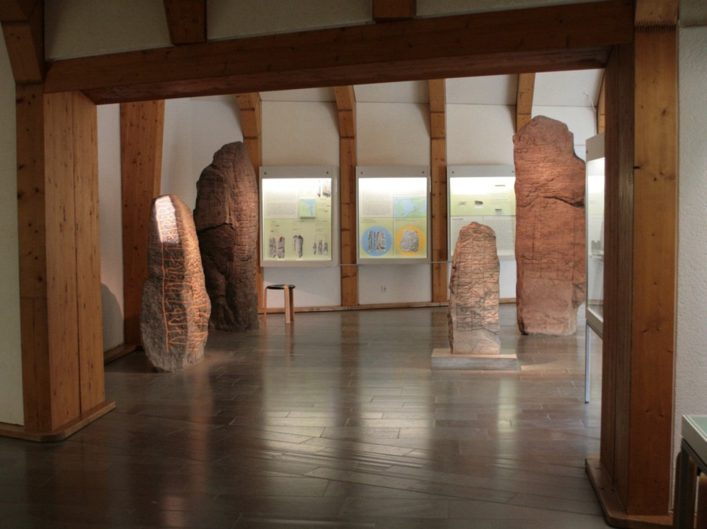 Vier in der Umgebung von Haithabu gefundene Runensteine. Stehen heute im Wikinger-Museum Haithabu.